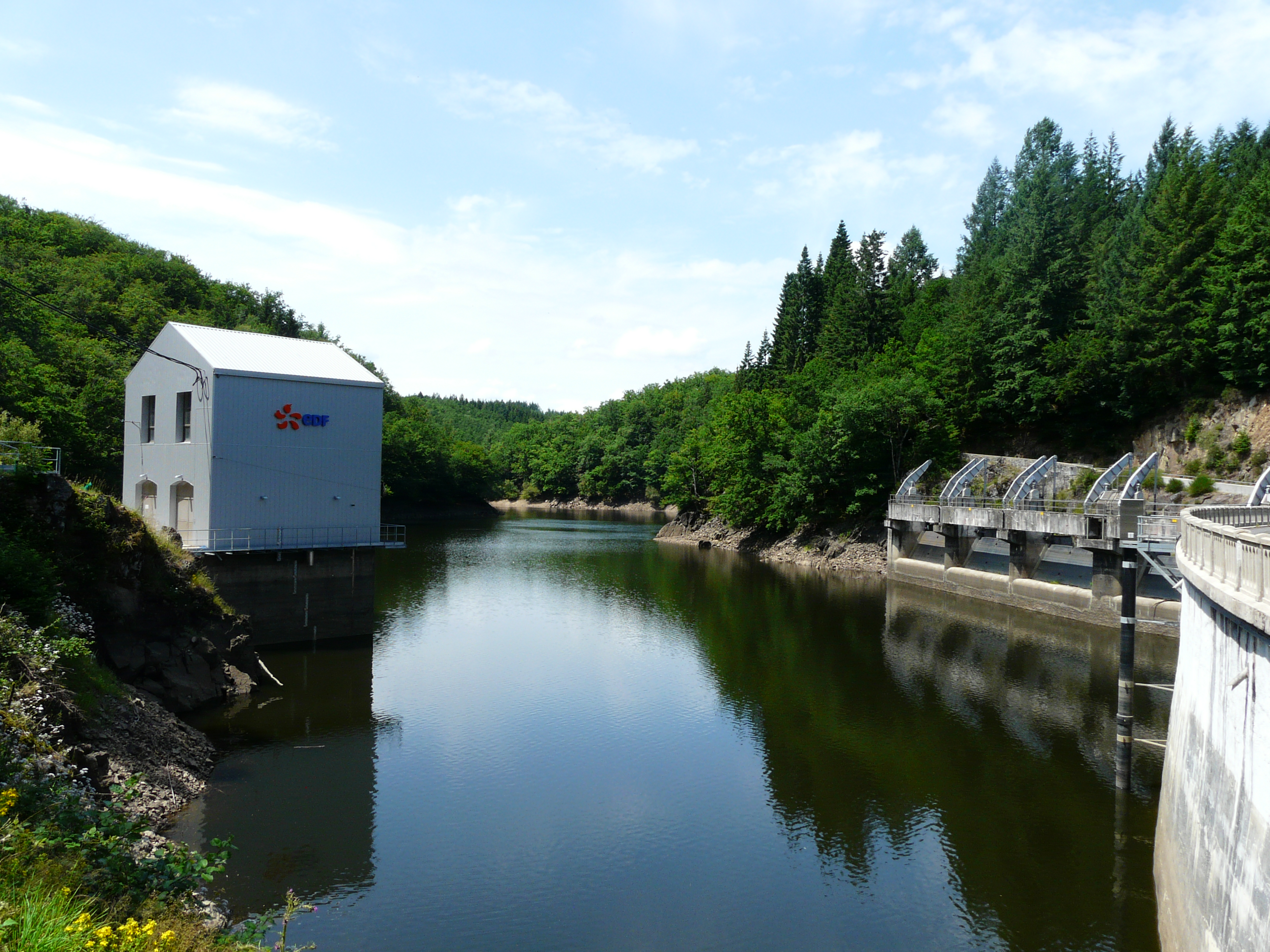 Le barrage des Chaumettes sur la Diège entre les communes de Roche-le-Peyroux (à gauche) et Saint-Victour (à droite) ; Corrèze, France.